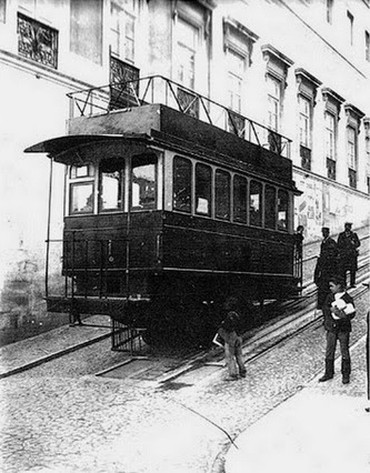 Ascensor da Glória no início do séc. XX